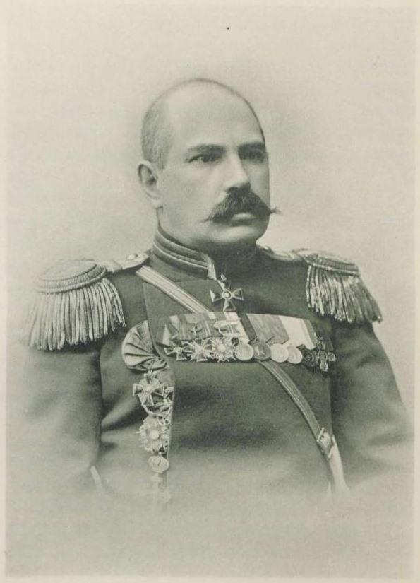 Командир полка полковник П. М. Самгин с 1900 г.